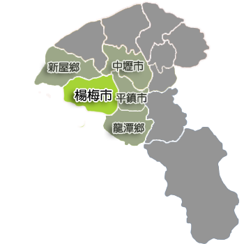 楊梅市行政區劃